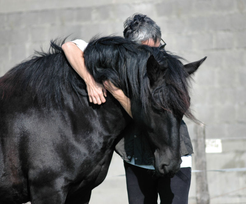 Nickel de Vives, cheval de Mérens très câlin (et cabochard).